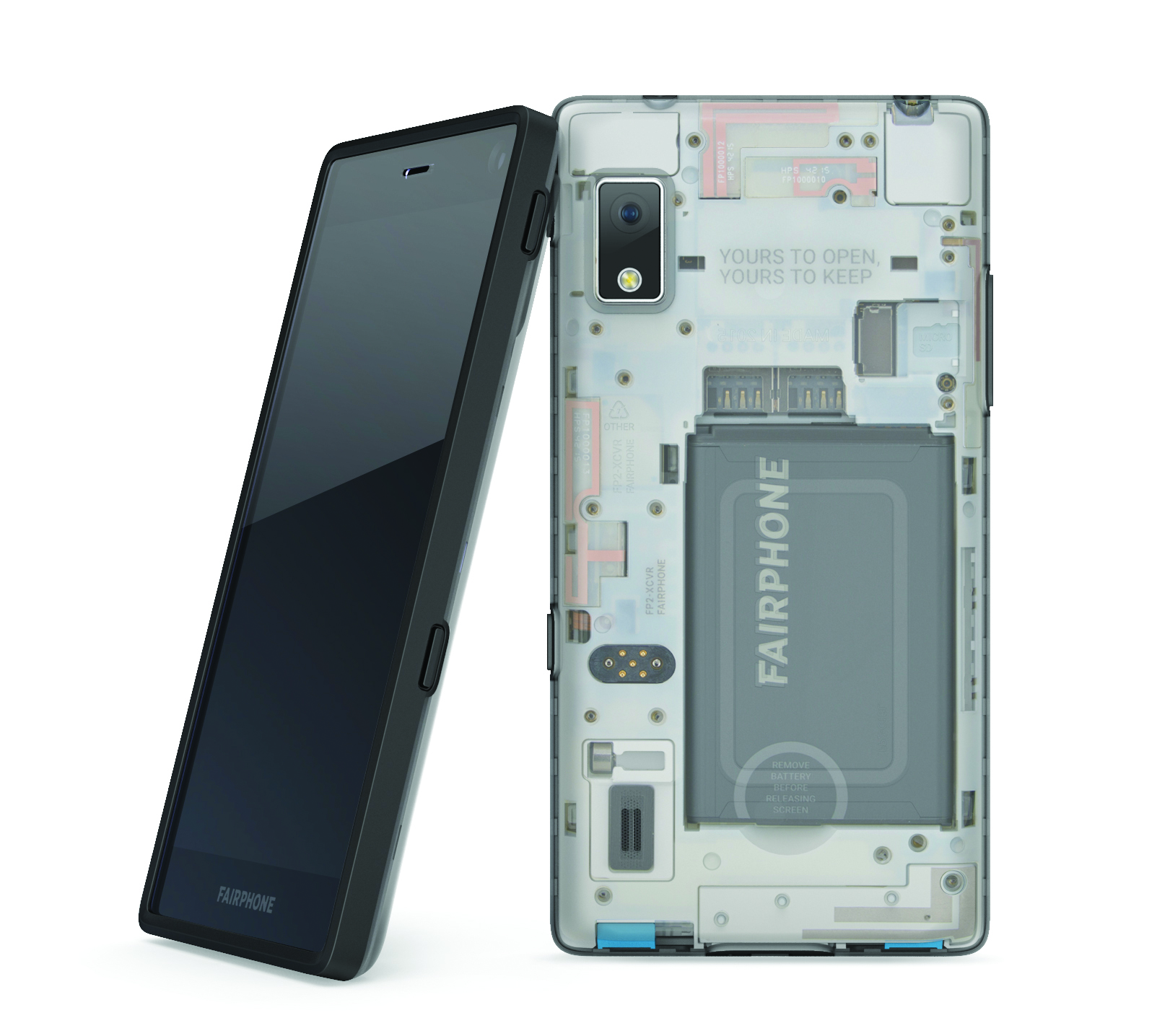 SIDE VIEW transparent